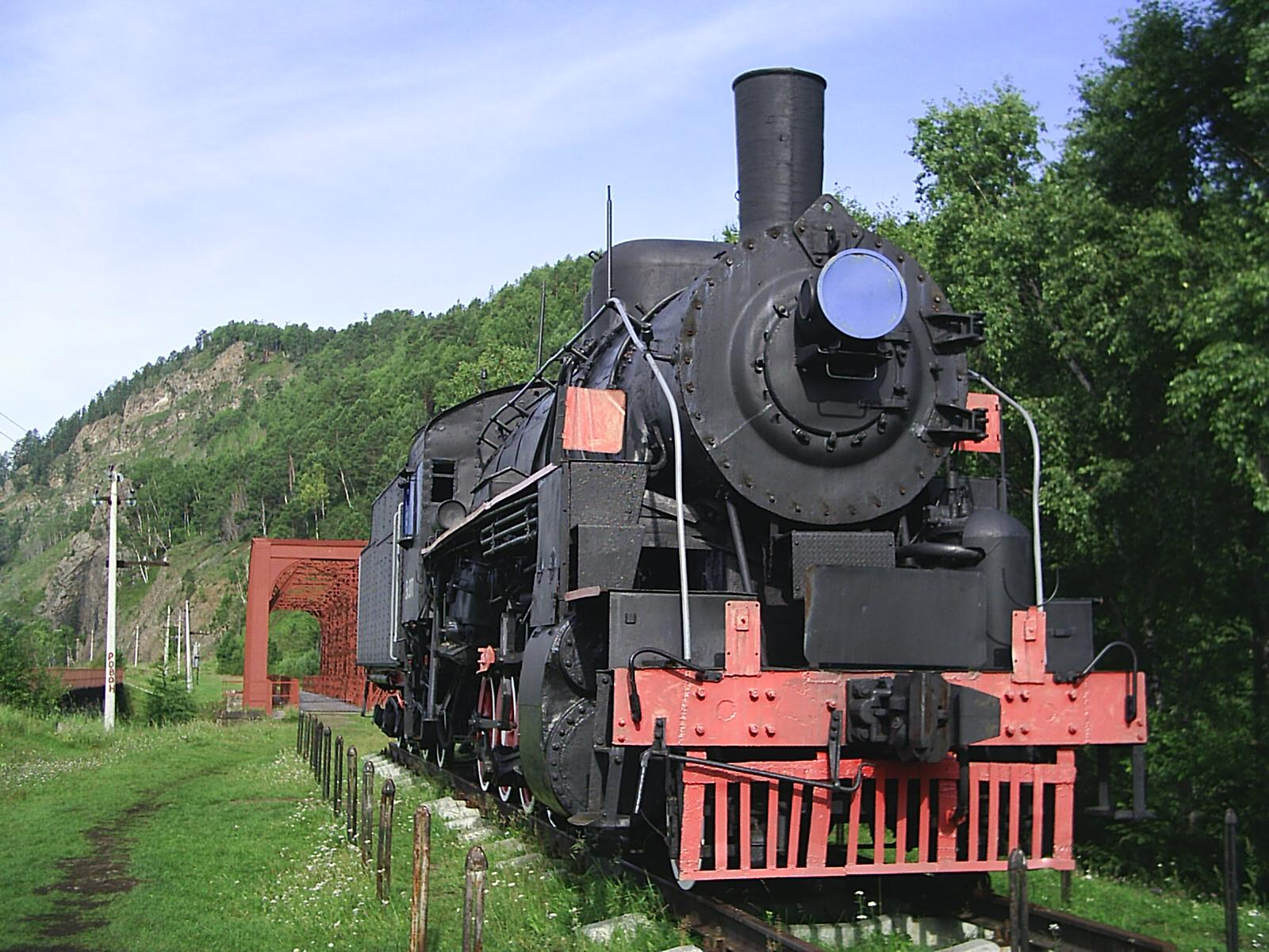 КБЖД. Паровоз-памятник на станции Половинный. Снимок августа 2006 г.